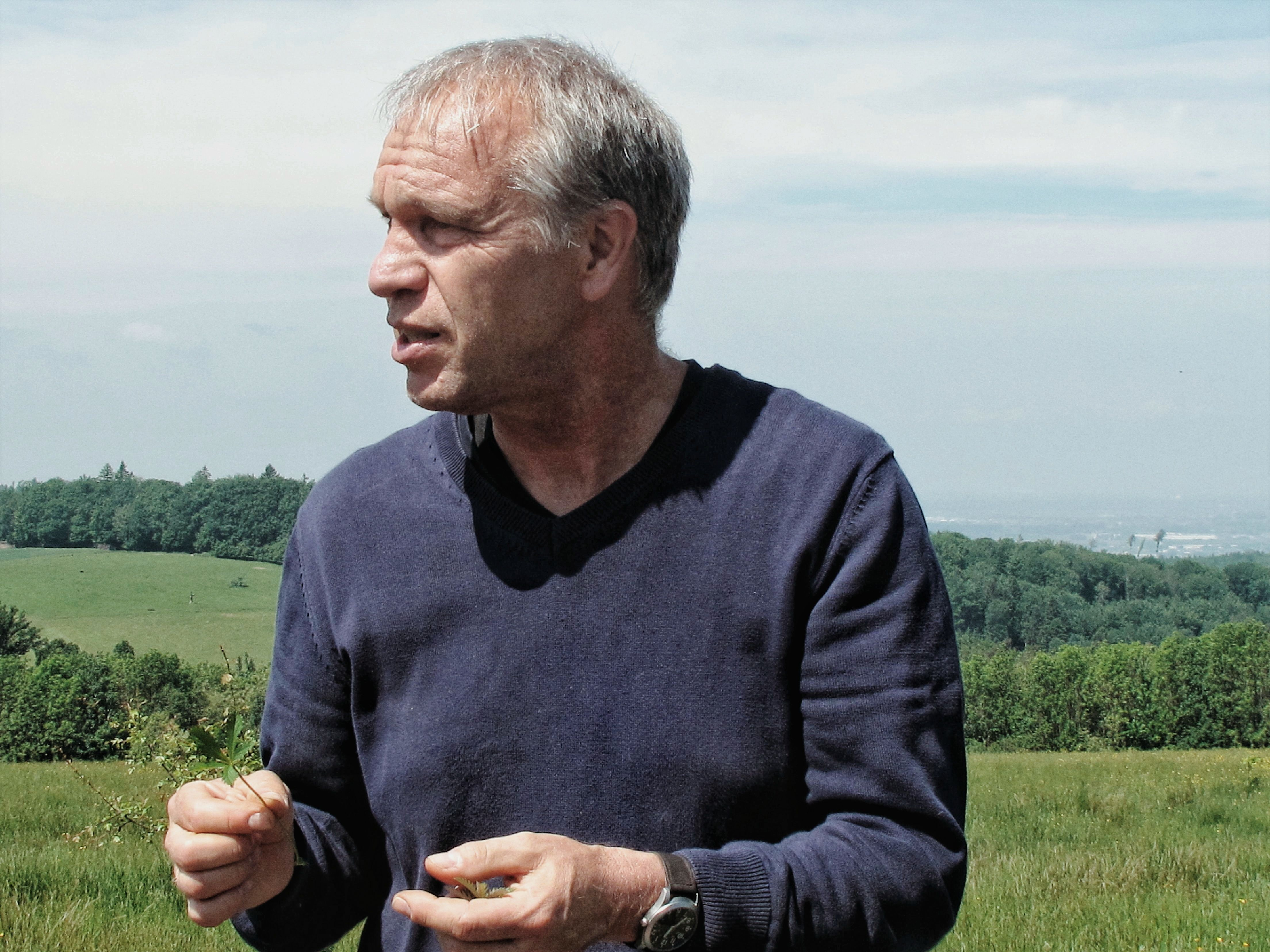 Rudi Beiser als Dozent bei einer Kräuterwanderung (2018)